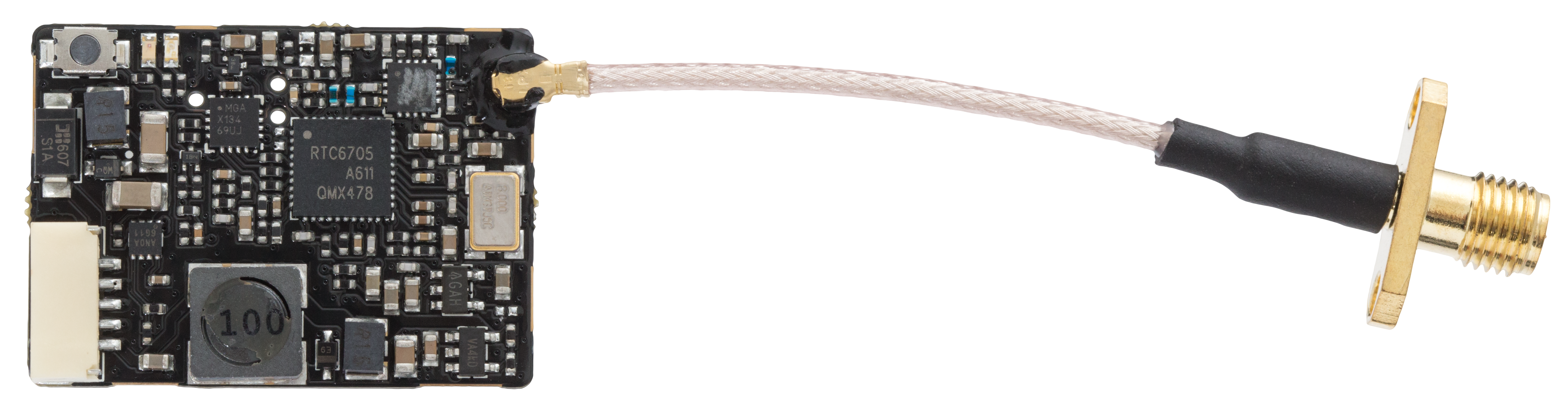 TBS Unify Pro HV Videosender für das 5,8 GHz Band